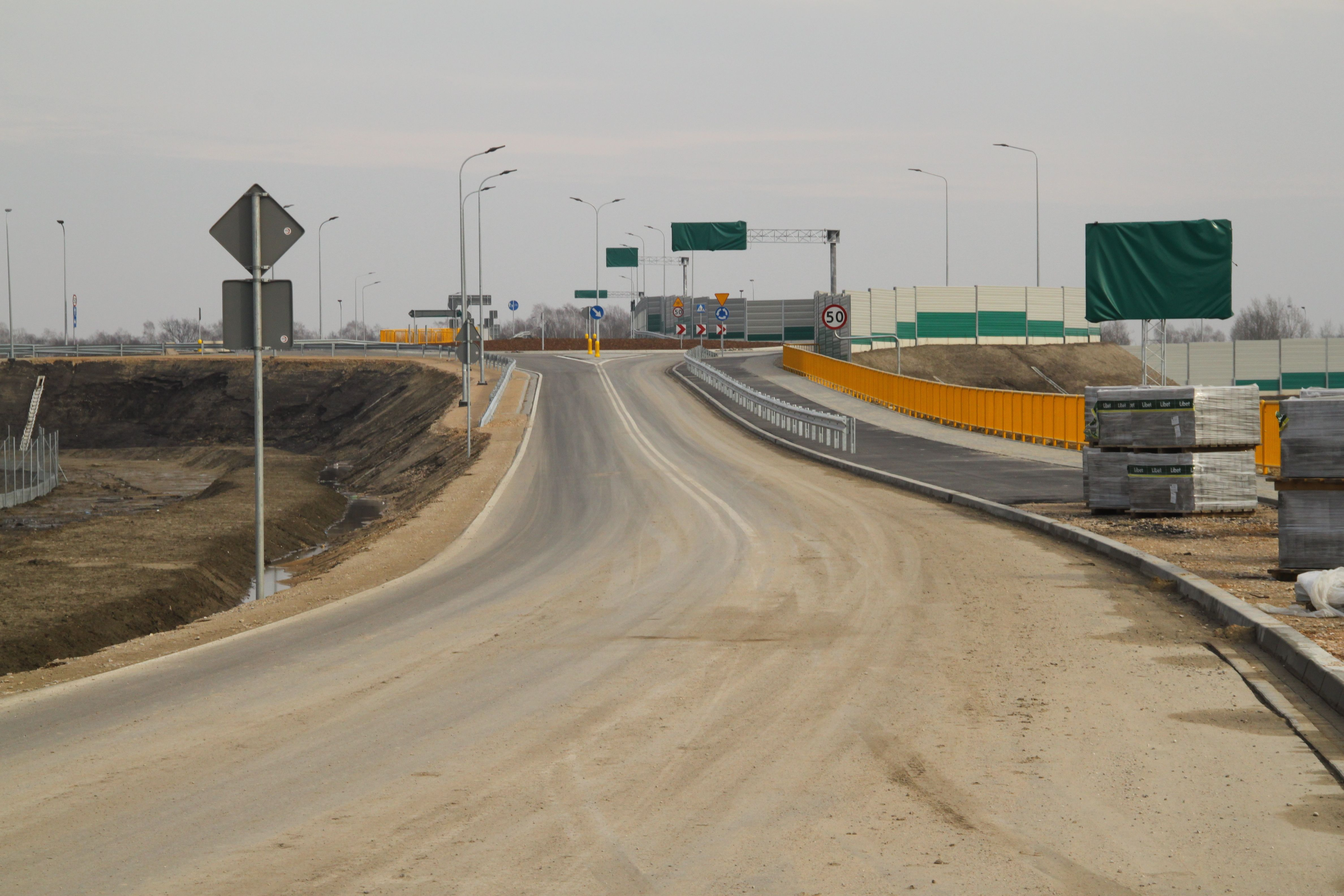 Węzeł Wołomin na Obwodnicy Marek, widok od strony Kozłówka, Nadmy